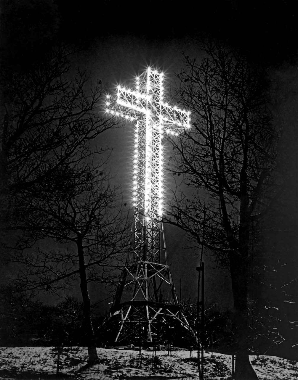 Croix du mont Royal, située à Montréal, au Québec.